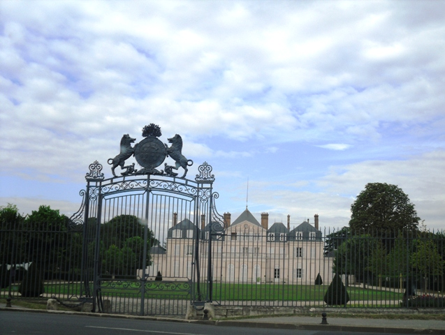 La façade Est du château de Paris-Jardin à Draveil (91)